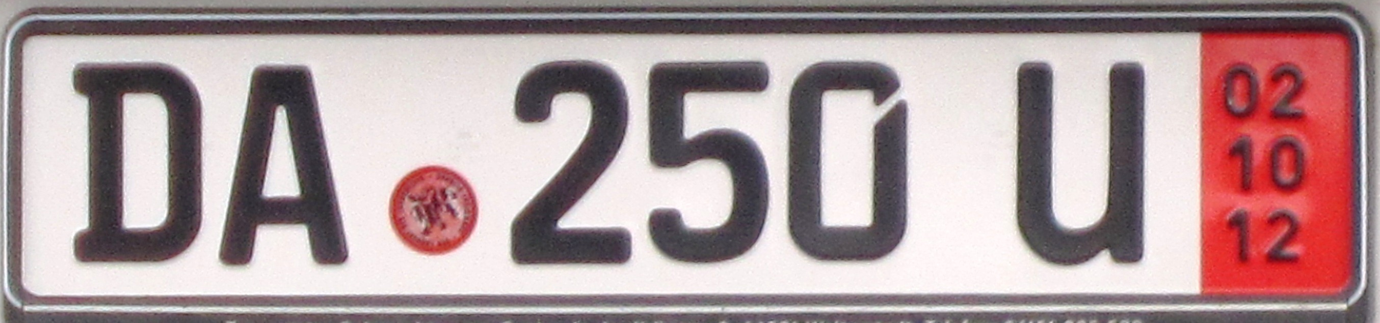 Duitsland export kenteken Darmstadt